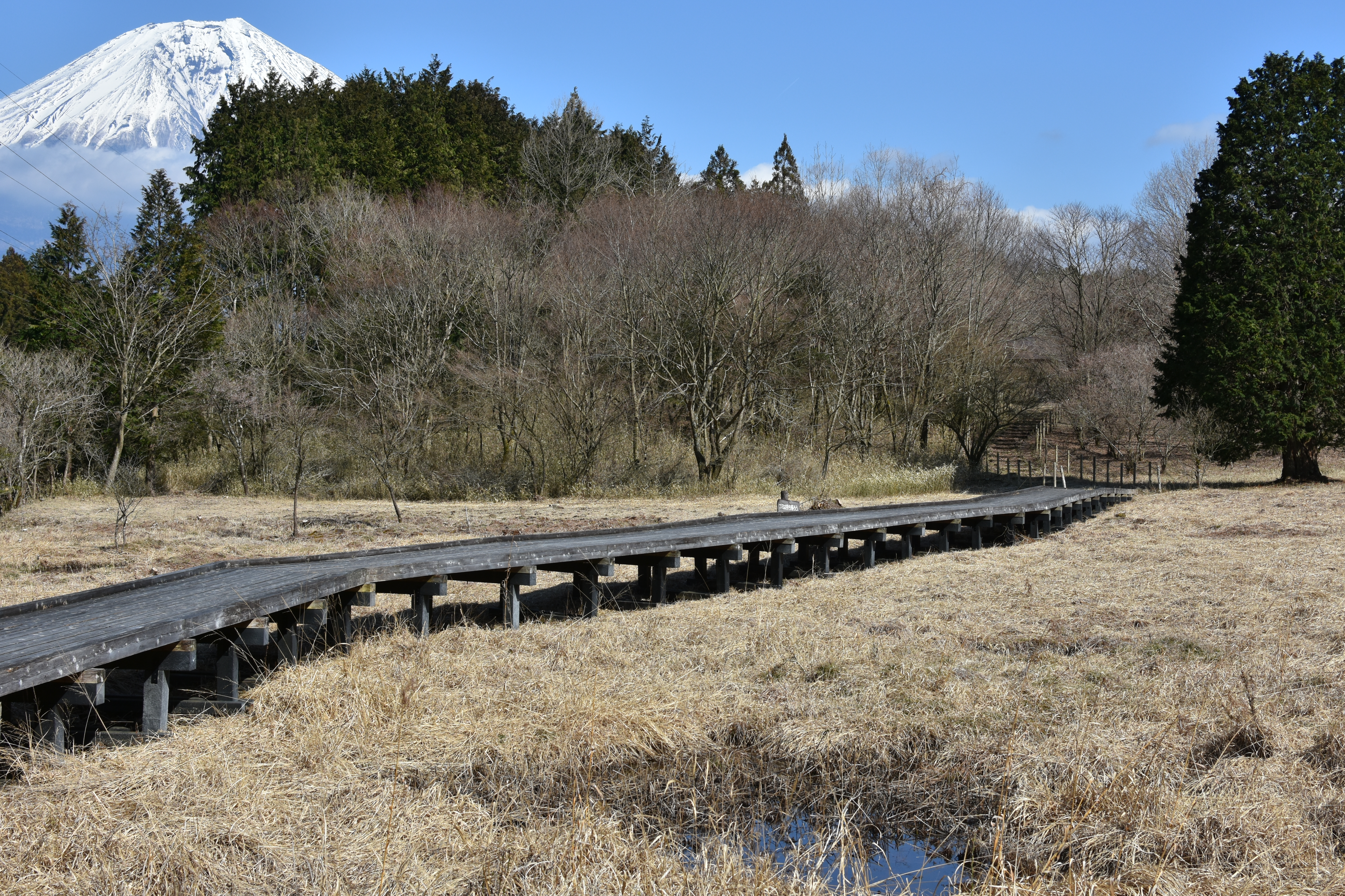 小田貫湿原と富士山